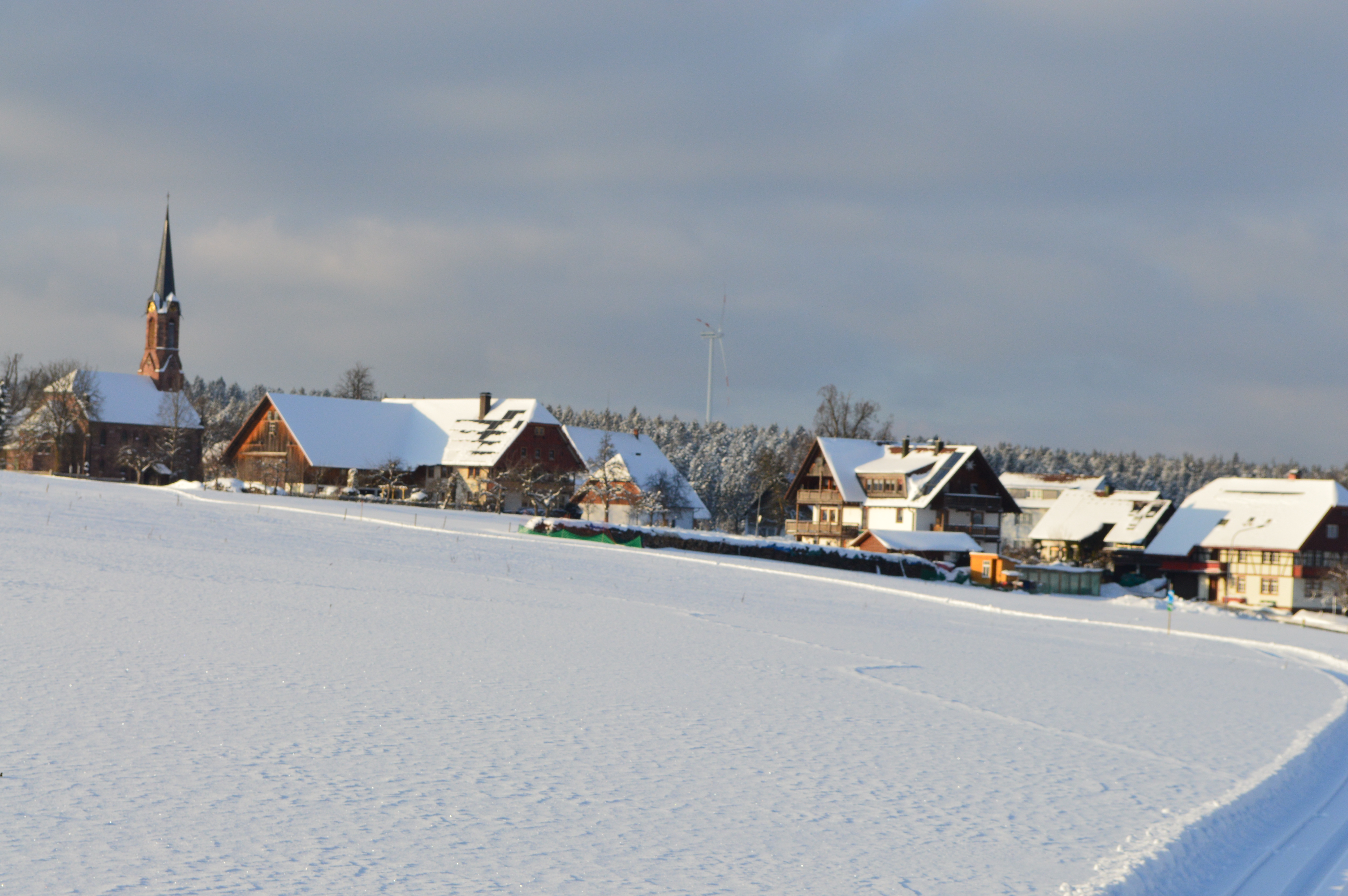 Buchenberg Winter 2017